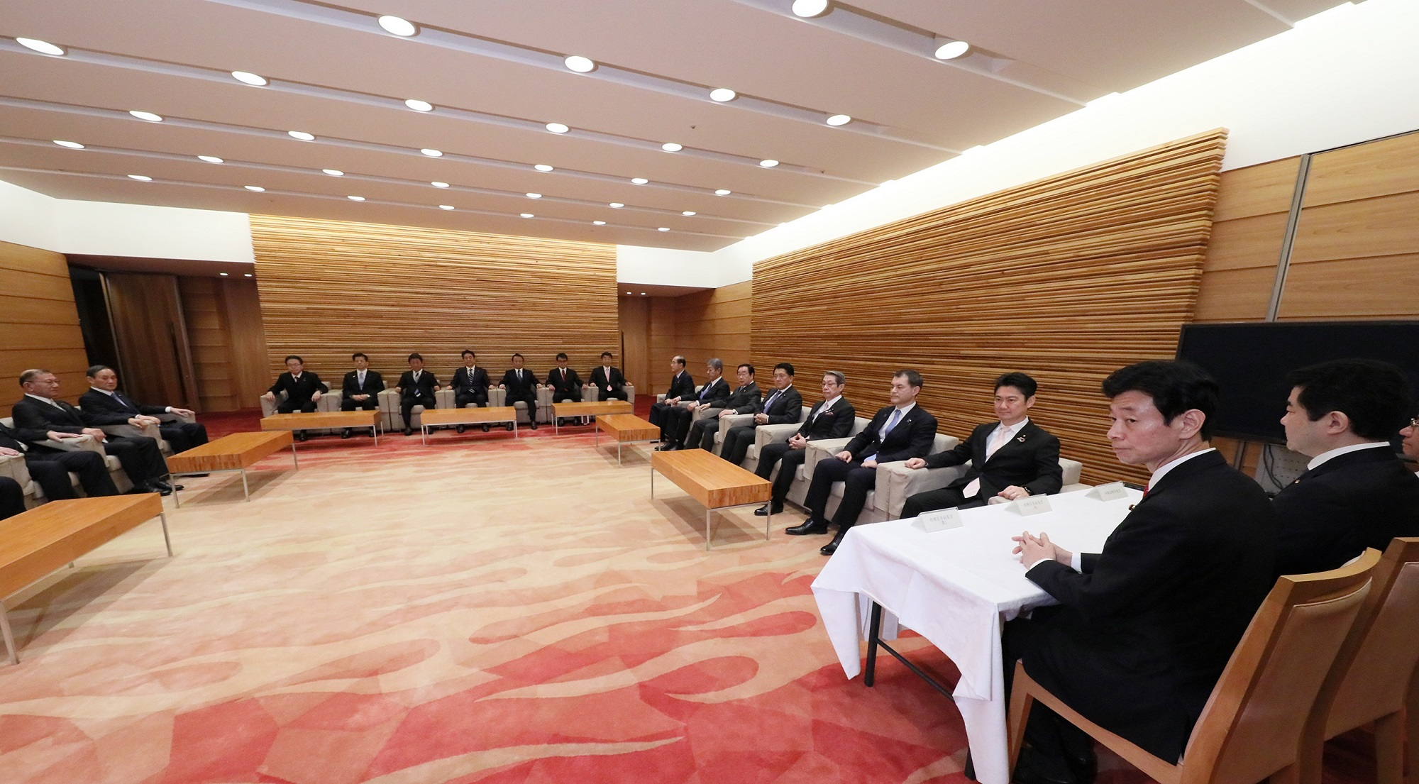 全閣僚会議